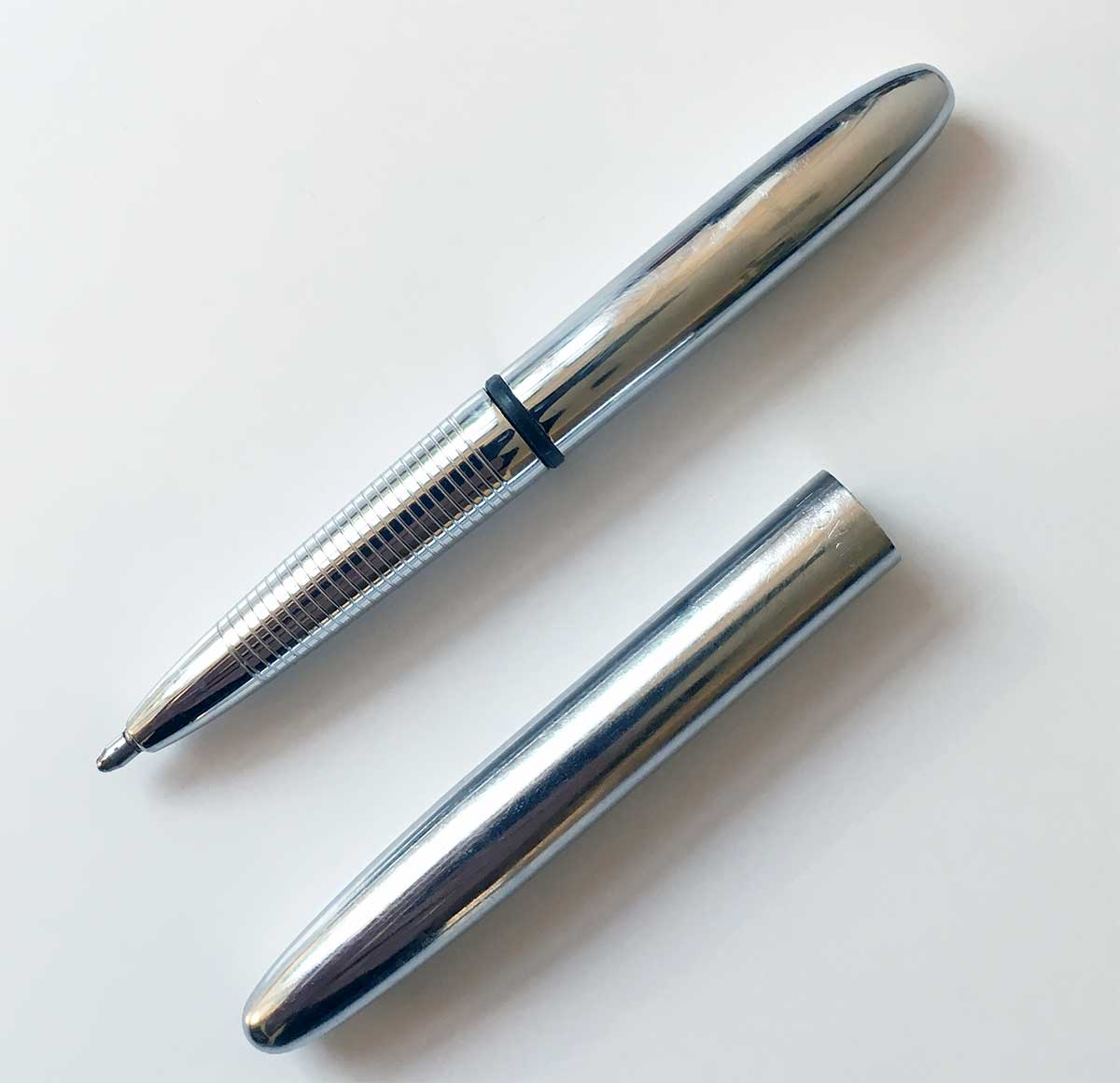 Fisher Space Pen ("Bulletpen") Visconti mit geöffneter Kappe.